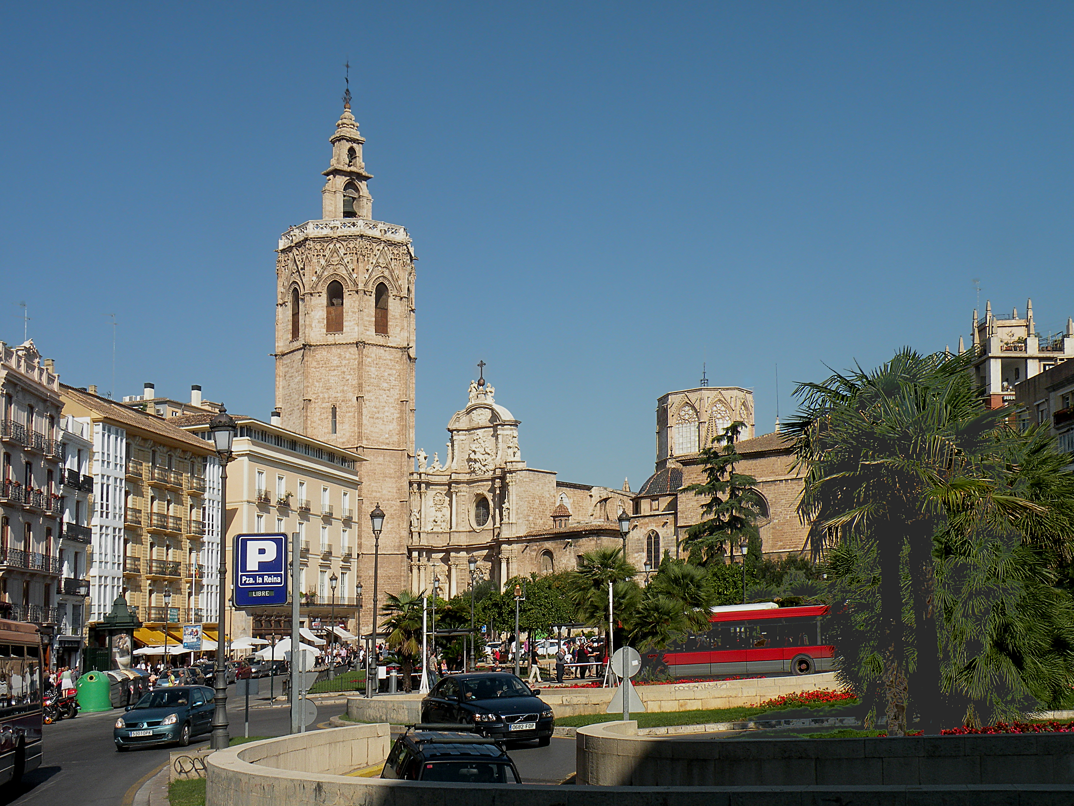 Plaza di la Reina, Valencia